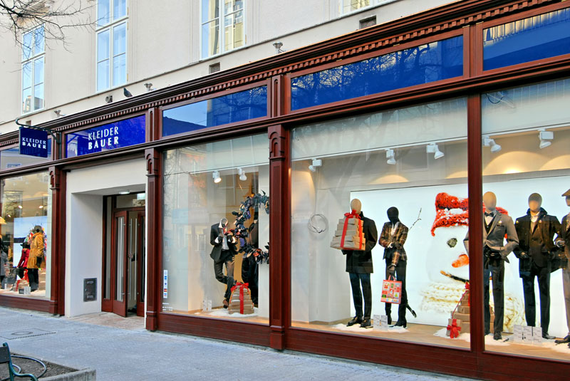 Der Flagship-Store von Kleider Bauer in Wiener Neustadt im Dezember 2011.